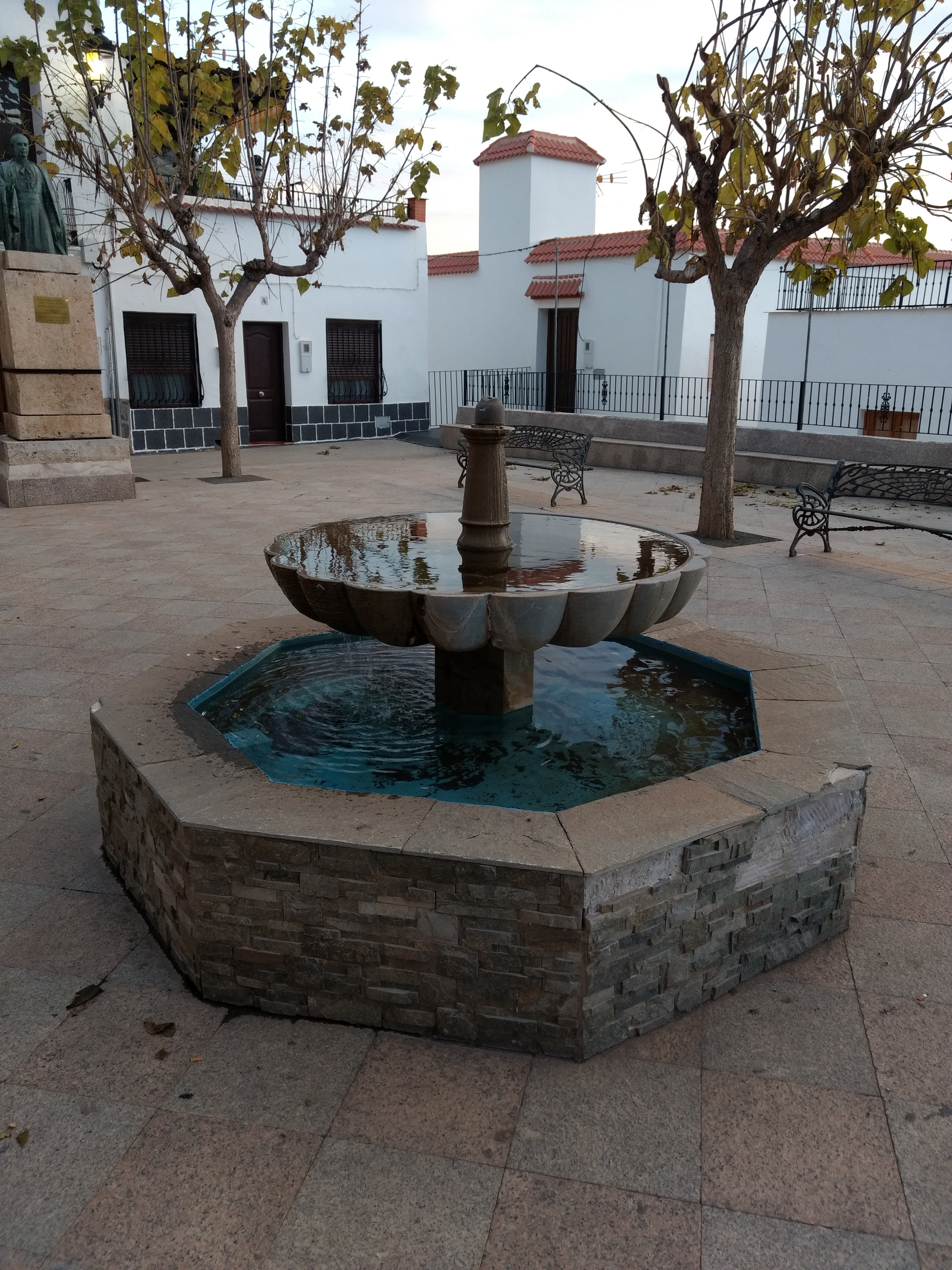 Ohanes (Almería)